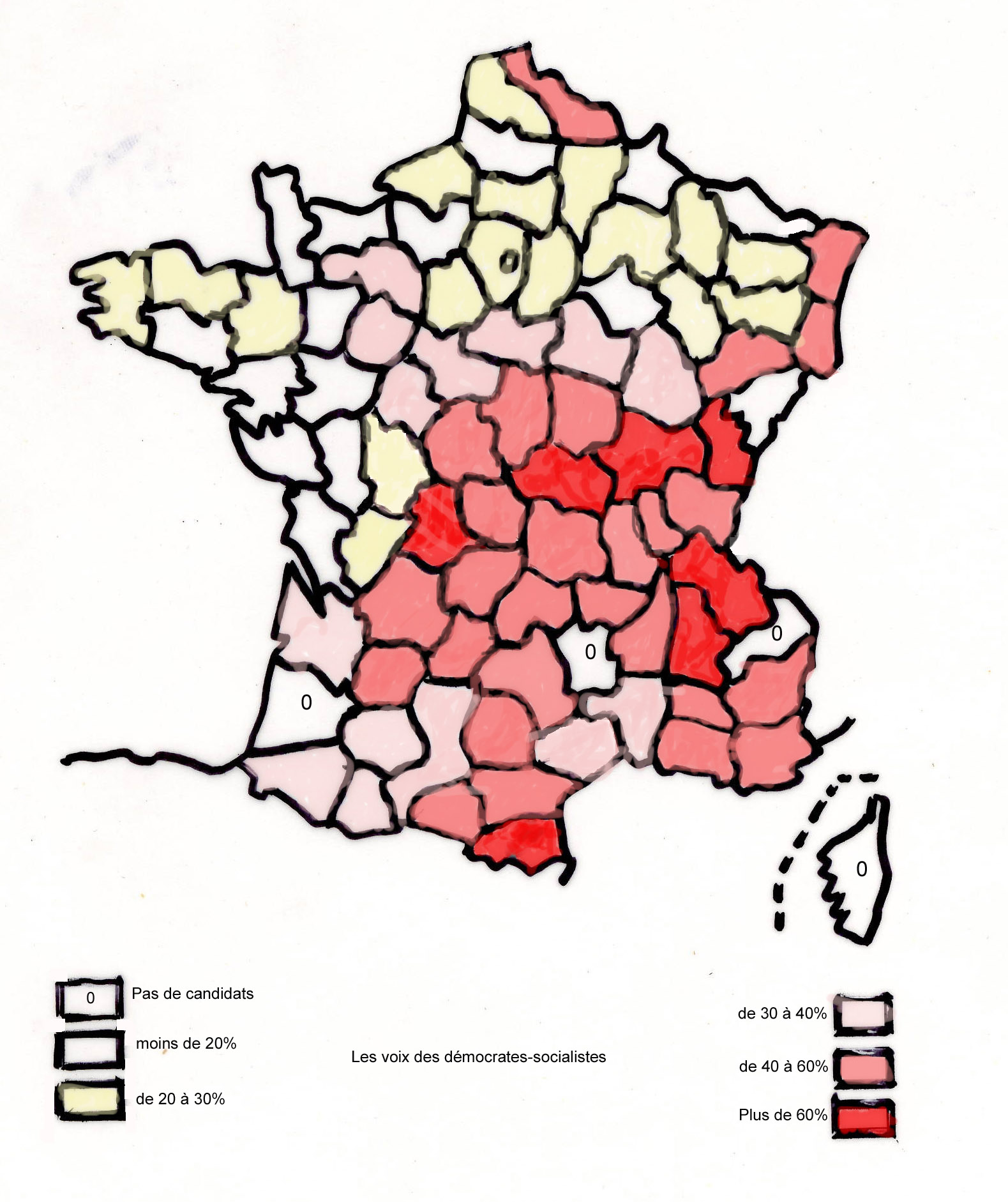 Carte des voix des démocrates-socialistes aux élections législatives de mai 1849.